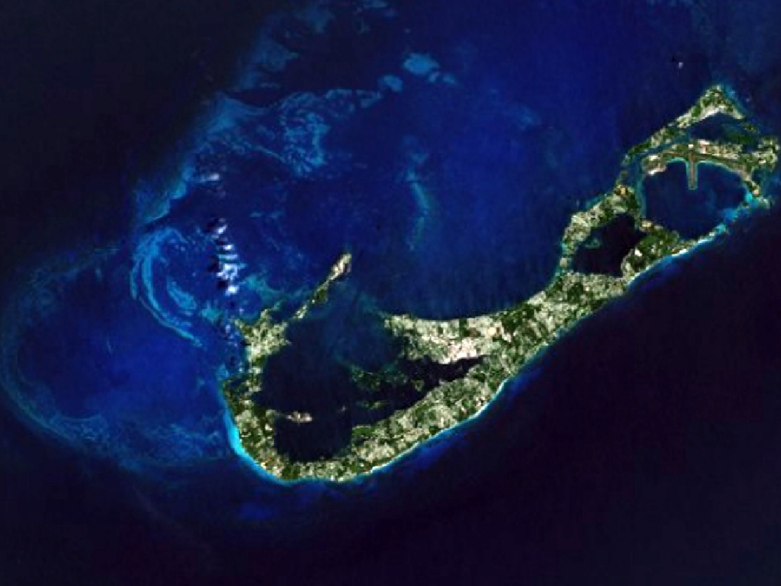 Bermuda from space